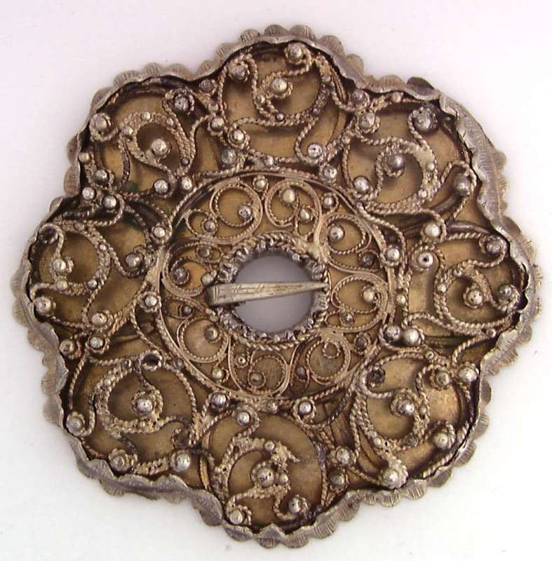 Trandeimsølje i forgylt sølv fra Valle i Aust-Agder. Foto Anne-Lise Reinsfelt / Norsk Folkemuseum, NF.1913-0915.